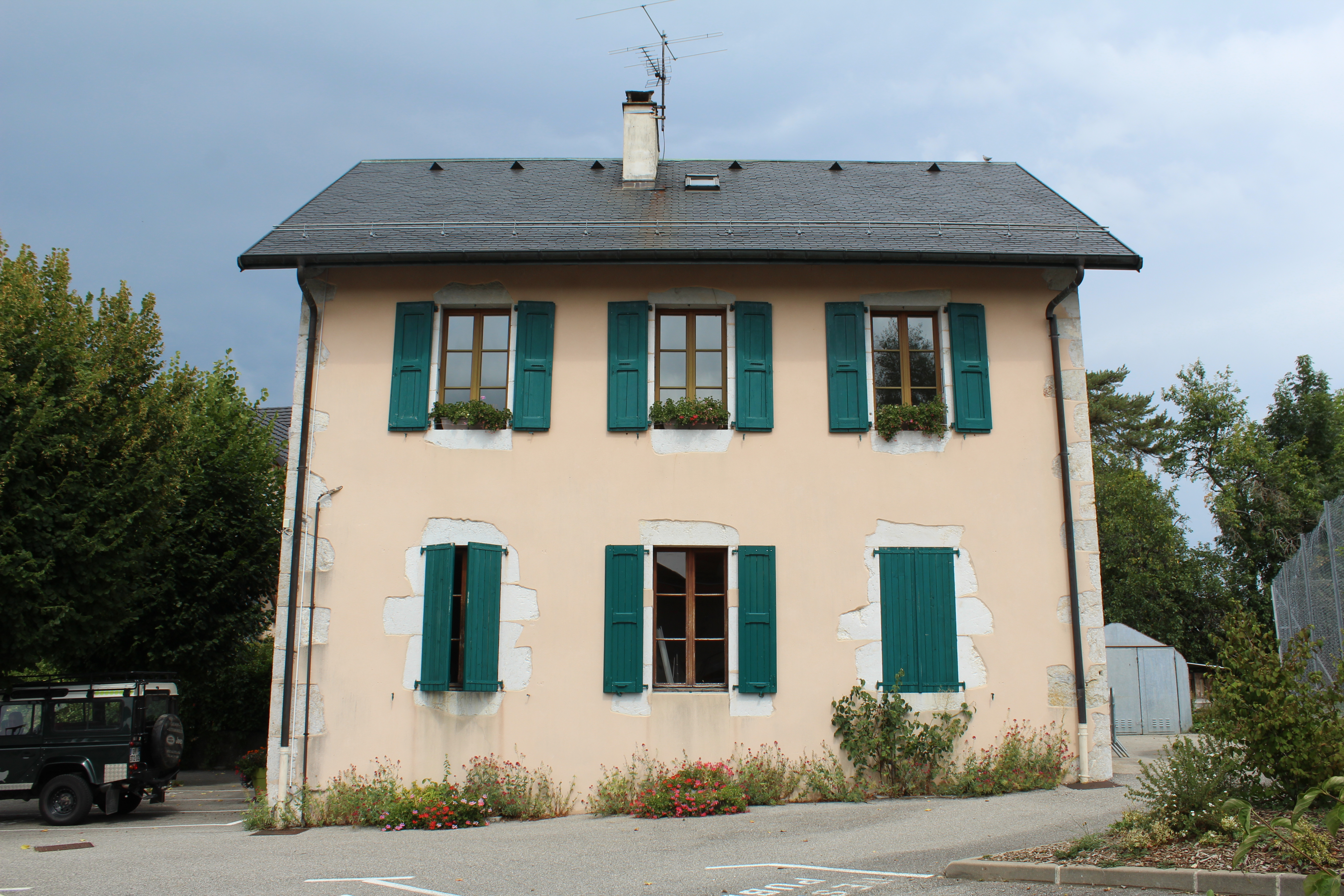 Mairie de Villy-le-Pelloux.